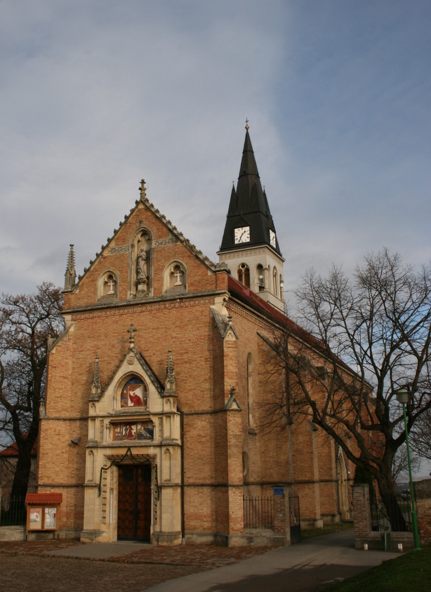 Crkva svetog Ivana Kapistrana u Iloku